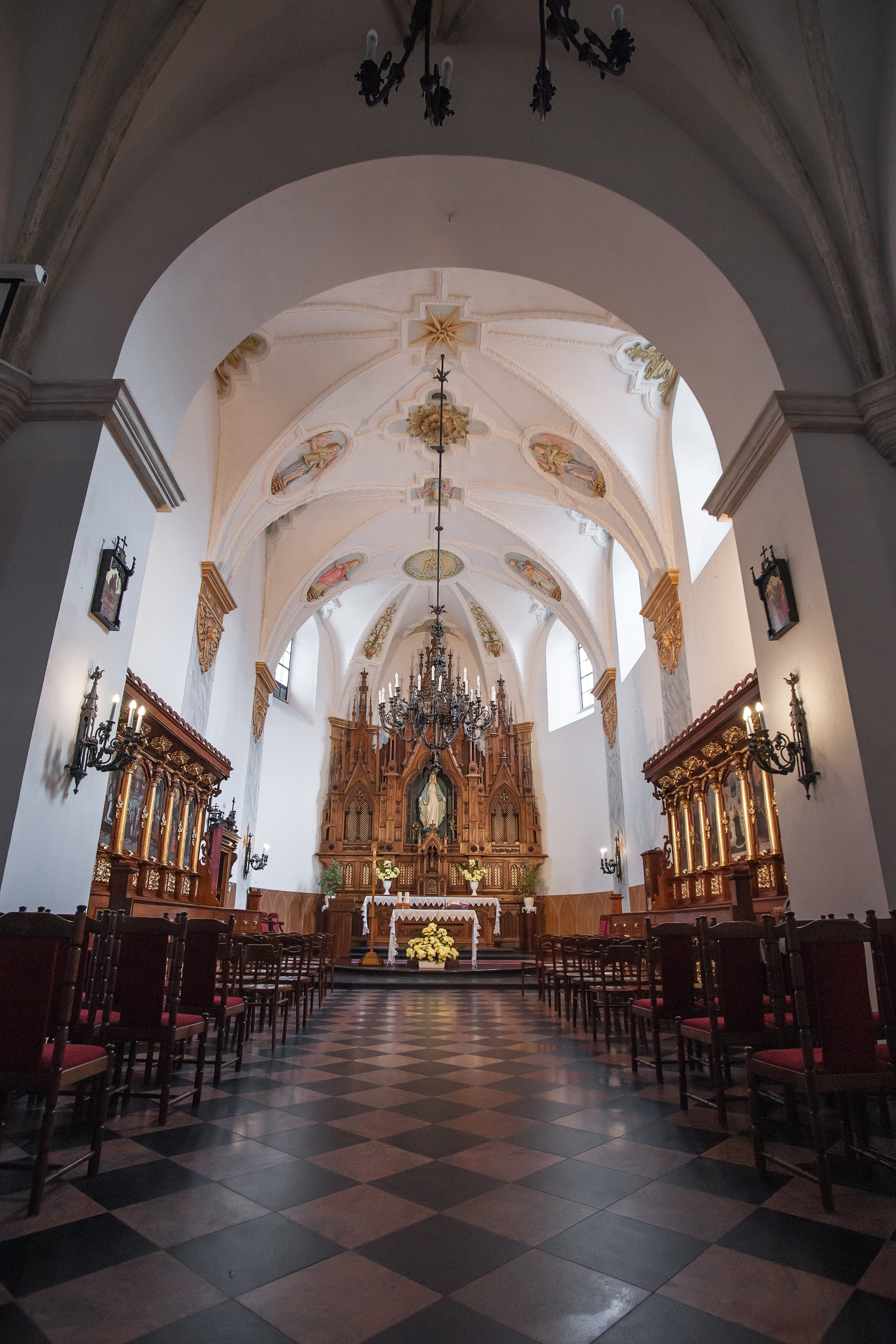 Lublin, kościół p.w. Matki Boskiej Zwycięskiej, XV, XVII, XIX